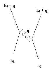 Elektronlardan biri fonon buraxır, o birisi isə bu fononu udur.